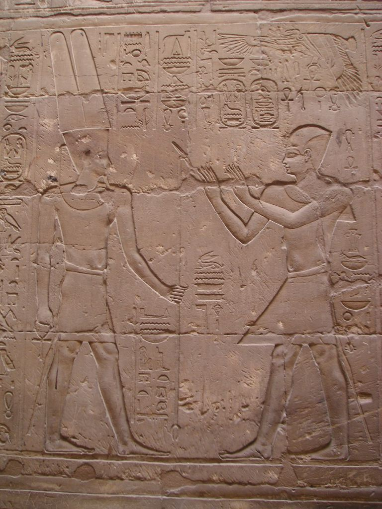 Relief représentant Alexandre le Grand priant le dieu Amon-Rê - Temple de Louxor - Période ptolémaïque